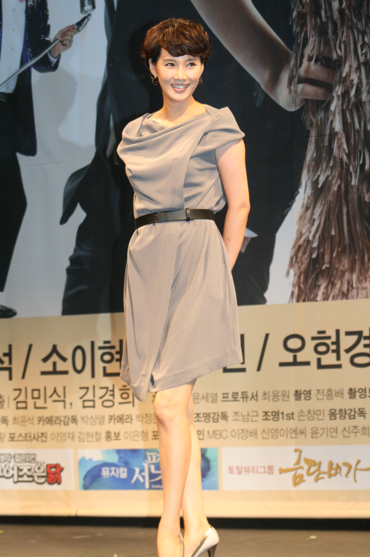 글로리아 제작발표회